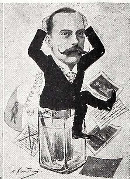 Plantilla de Blanco y Negro.